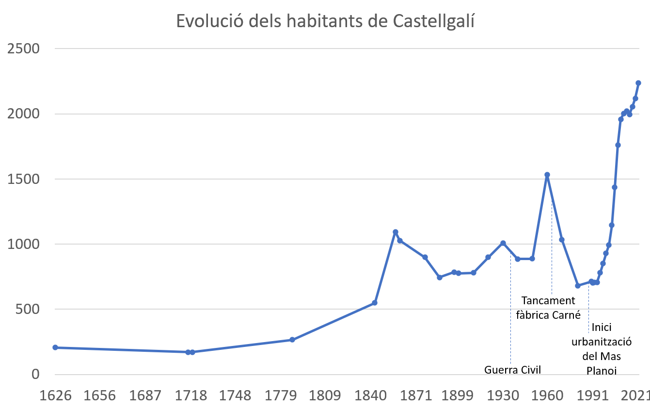 Gràfic demogràfic de castellgalí.